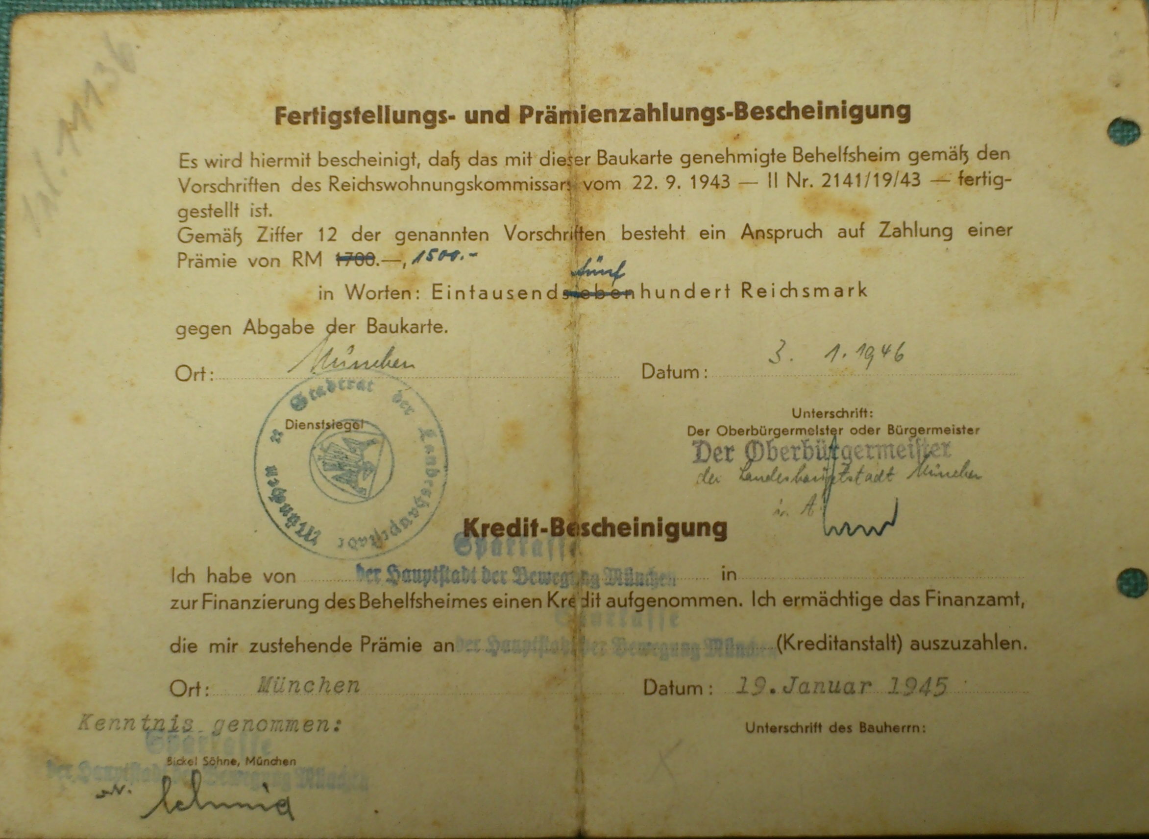 Deutsches Wohnungshilfswerk Baukarte